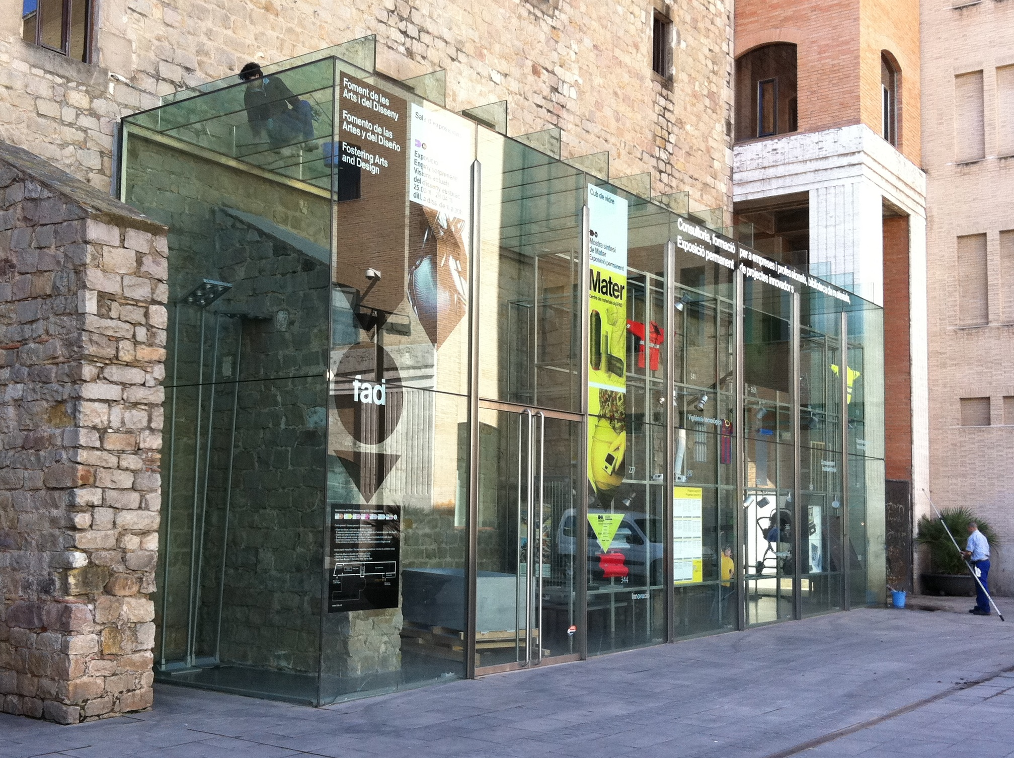 Foment de les Arts i el Disseny